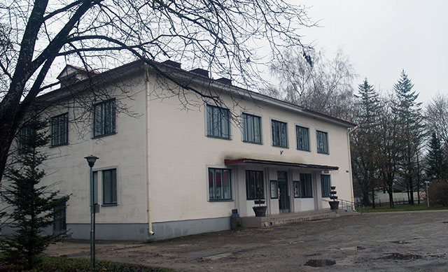 Põltsamaa 2013. sügis